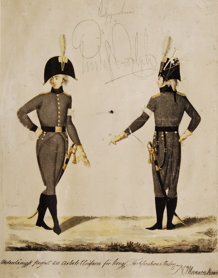 Uniform m/1807 för en officer vid fortifitkationen. Skapad av Nils Mannerskantz (1738-1809), och godkänd av Gustaf IV Adolf. FMB.000211